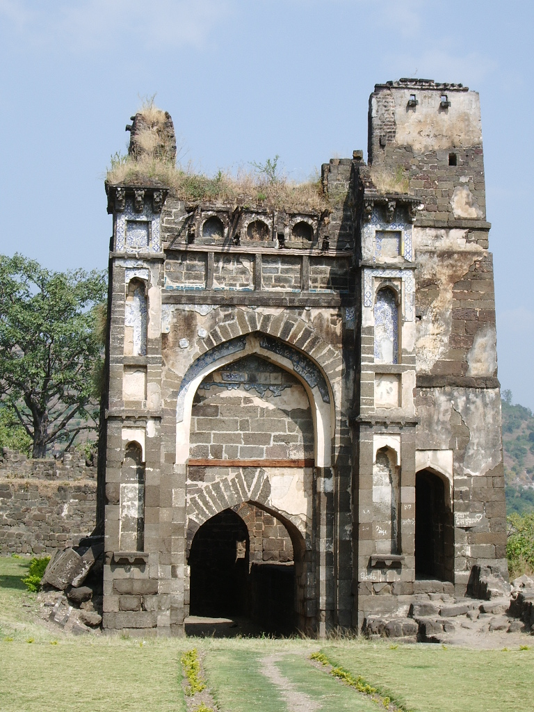 ダウラタバード要塞の幽閉所